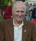 Fred tar emot Sigtunas Hembygdspris 2003